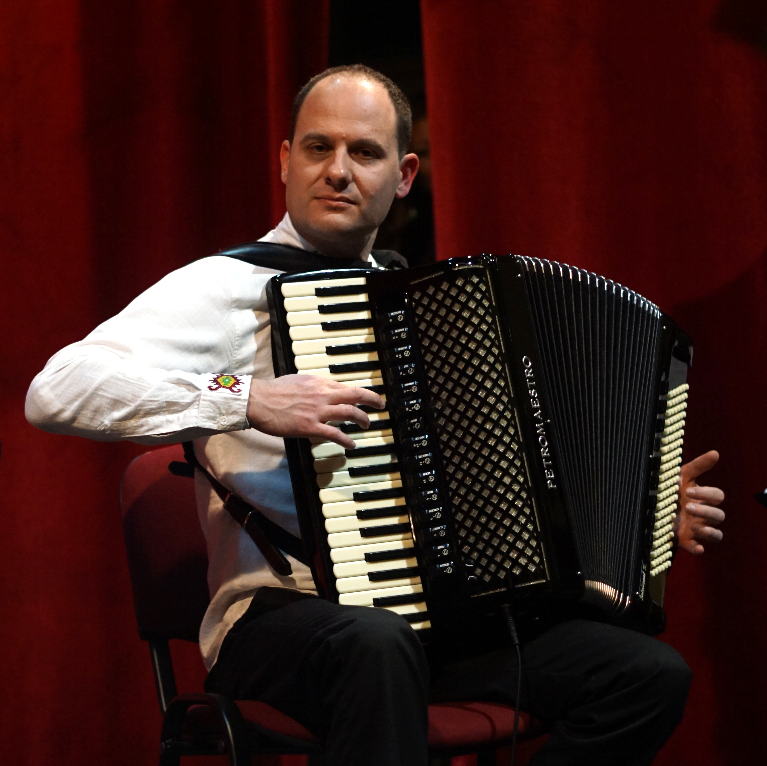 Solistički koncert u Somboru, 2017. godina.